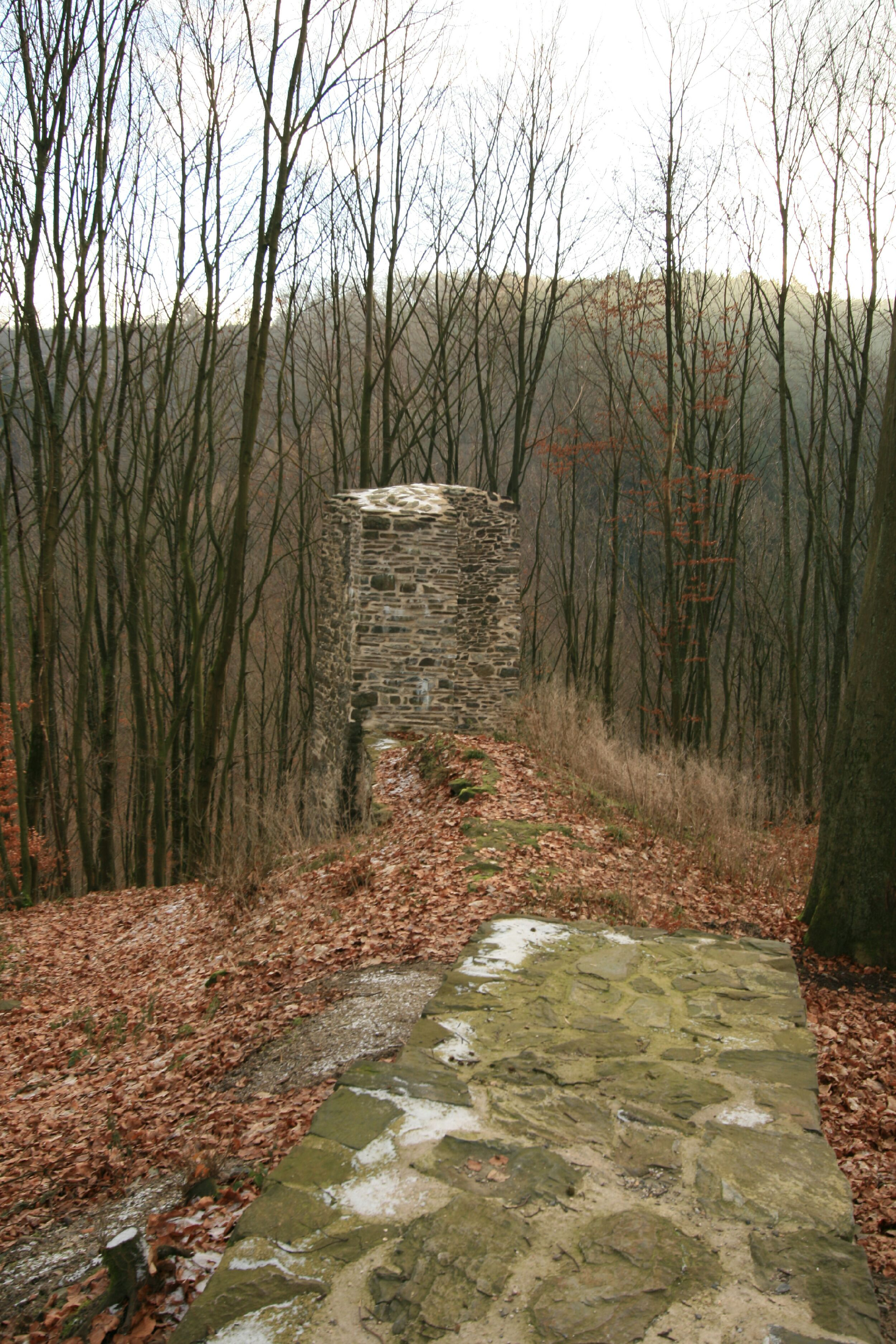 Burg Waldenburg (Attendorn) Blick nach Süd-Osten